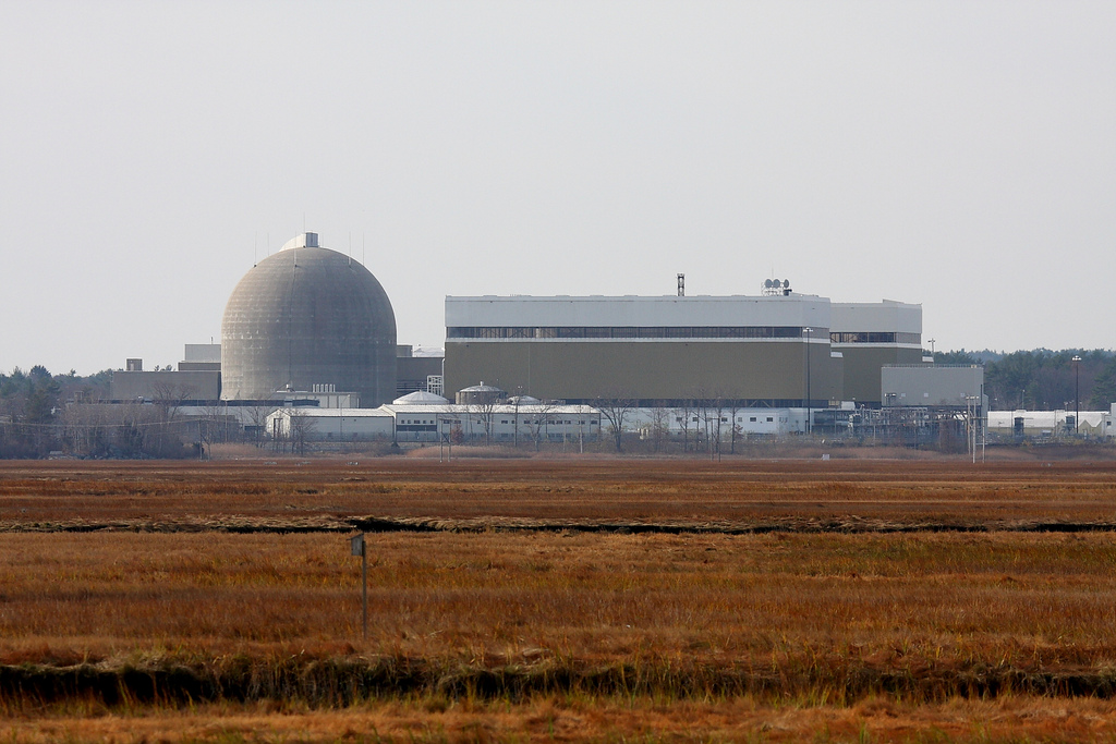 IMG_1525a